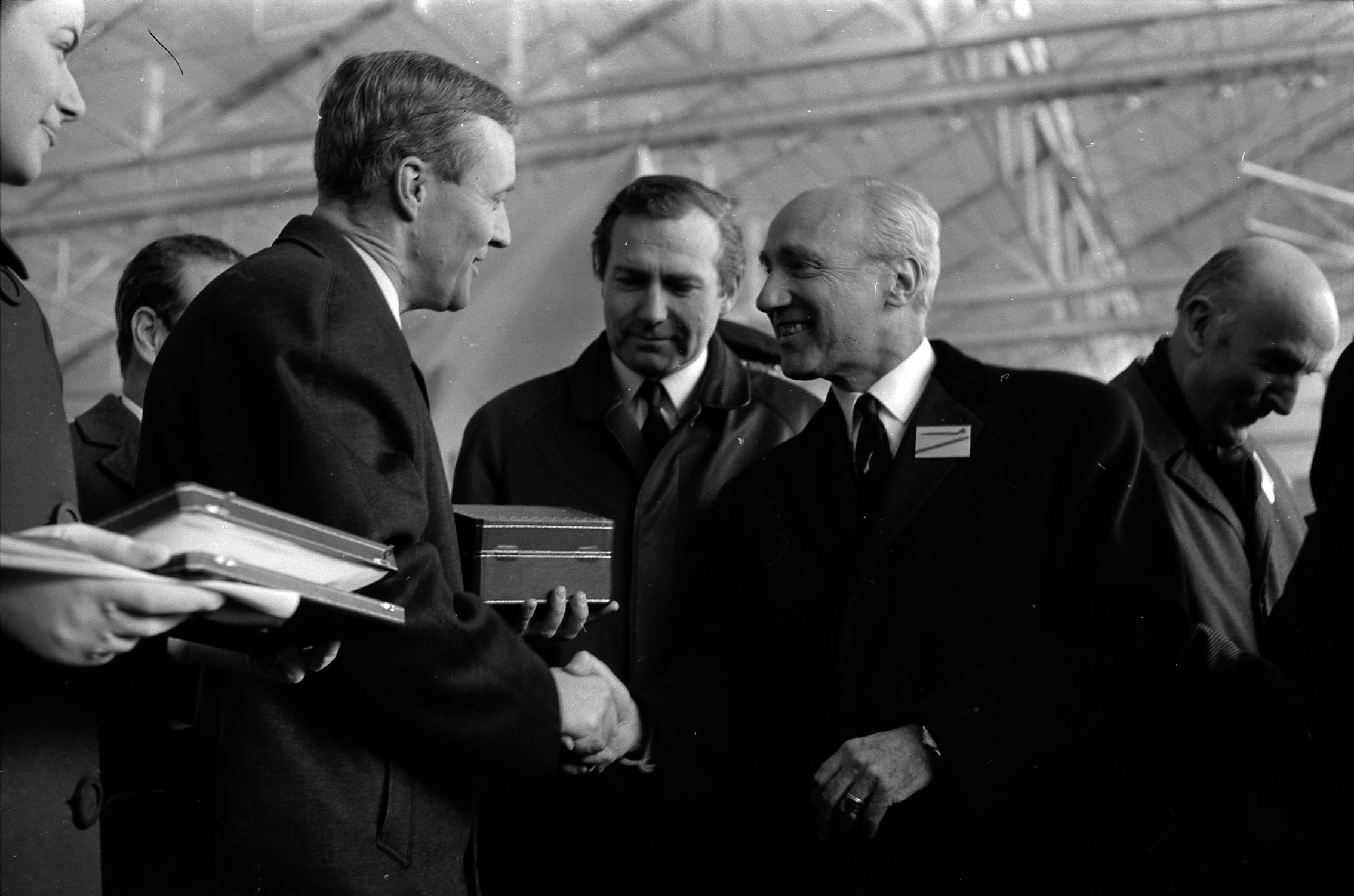 Ateliers Sud Aviation (Saint-Martin-du-Touch). 11 décembre 1967. Plan taille de Maurice Papon (Président de Sud Aviation) remettant un souvenir à Anthony Neil Wedgwood Benn (ministre anglais de la Technologie), les deux hommes se serrent la main, autres personnalités autour. Cliché pris lors de la présentation officielle du prototype français du Concorde.